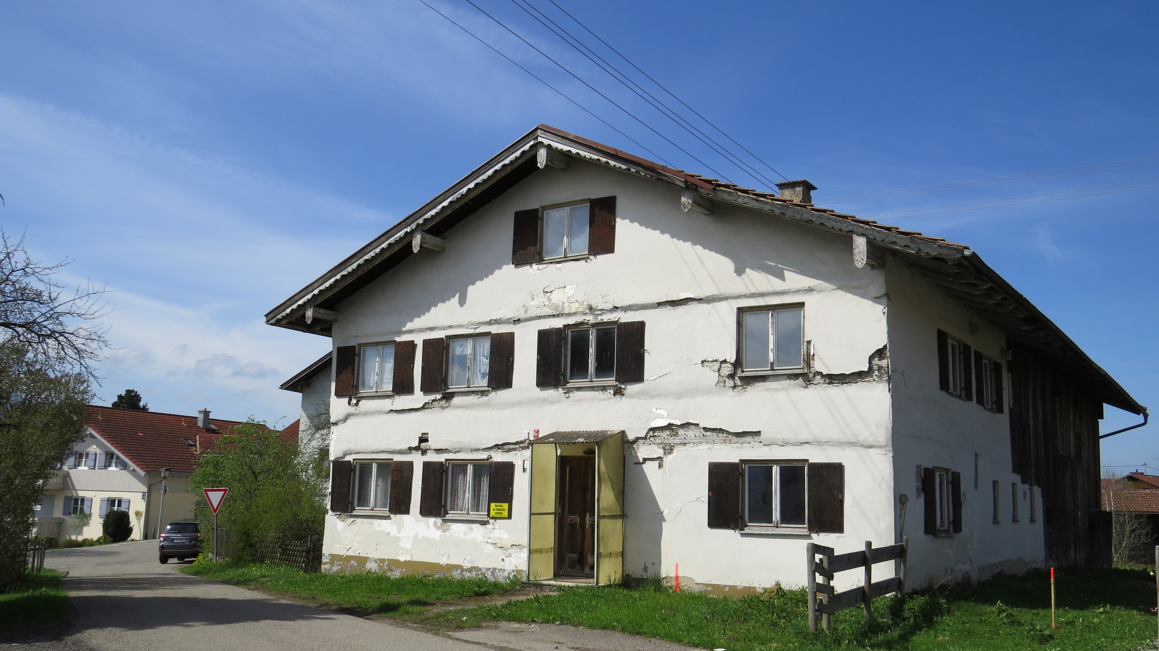 Alte Dorfstr. 1 in Moosbach, Sulzberg